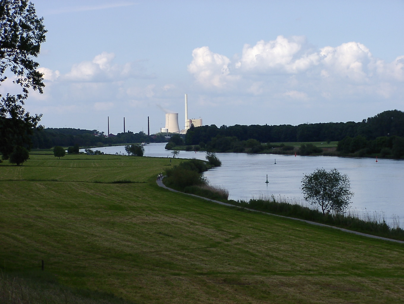 Blick von der Valentinsmühle in Todtenhausen auf die Weser und den Weserradweg in Richtung Petershagen (linke Türme) und Lahde mit dem Kraftwerk Heyden.